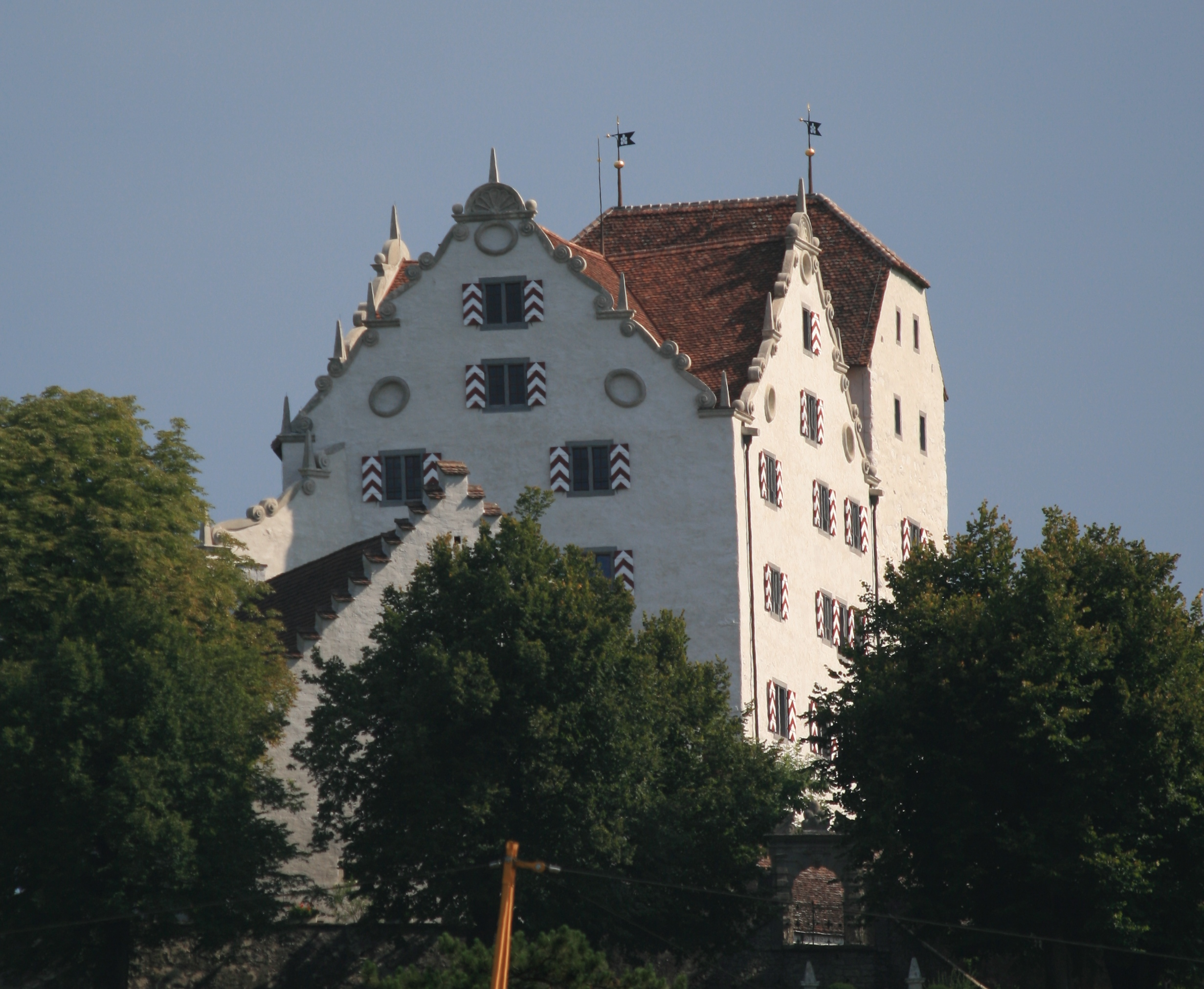 Schloss Wildegg nach der Renovation von 2011